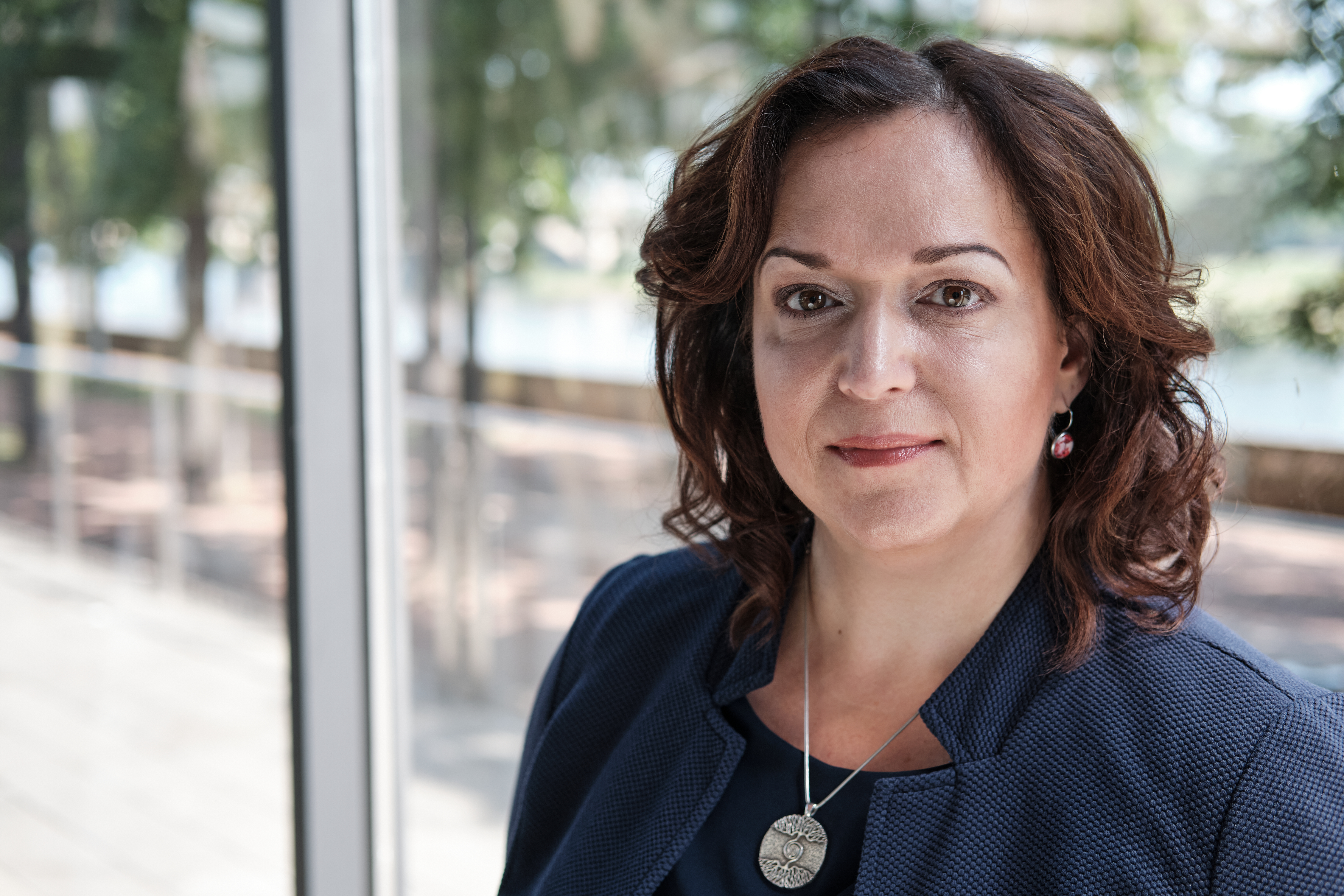 Simone Lang, 2020 Foto: Stefan Kraft